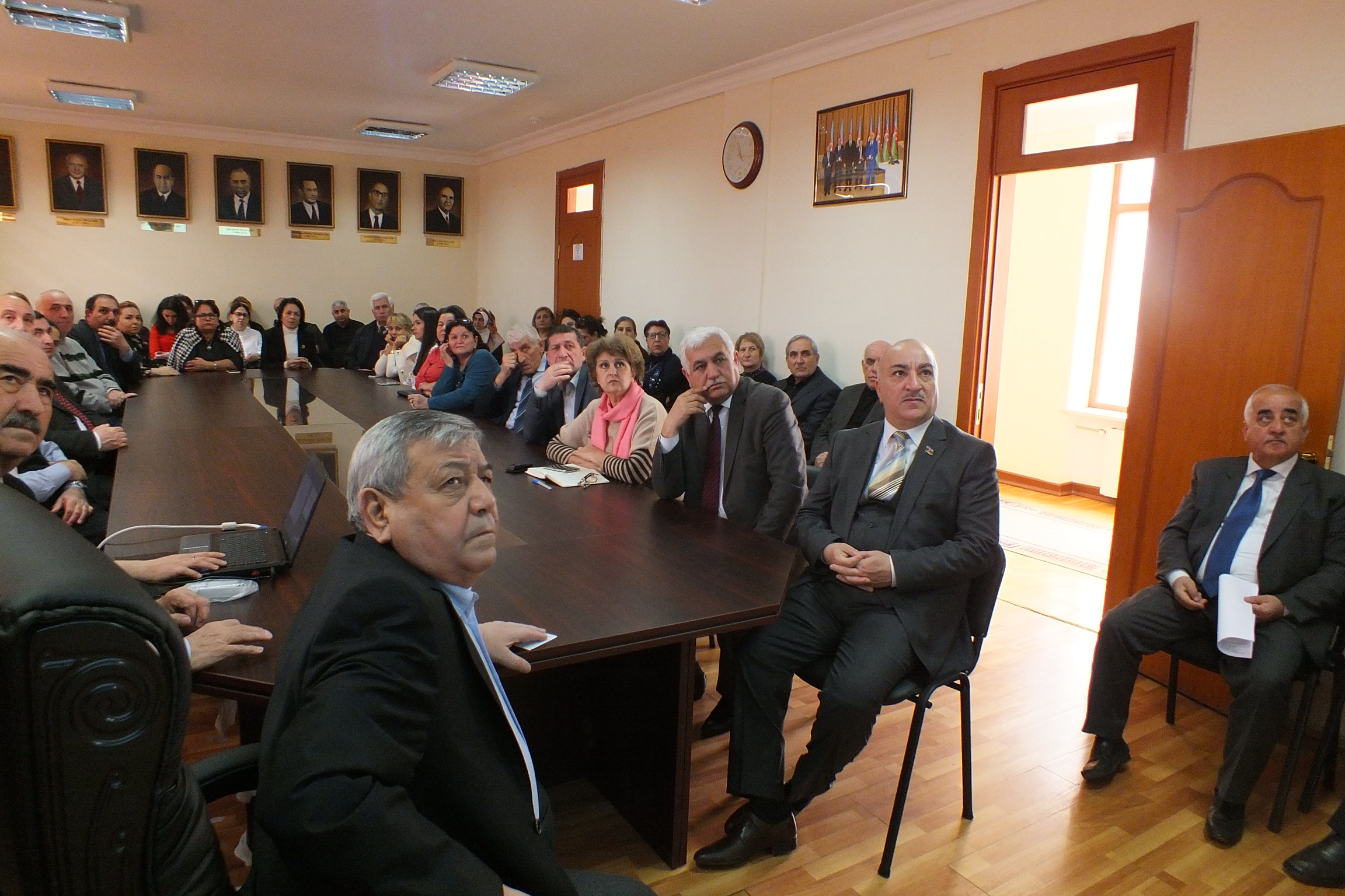 AMEA ak.H.Ə.Əliyev adına Coğrafiya İnstitutu AXC 110 illik yubiley tədbiri